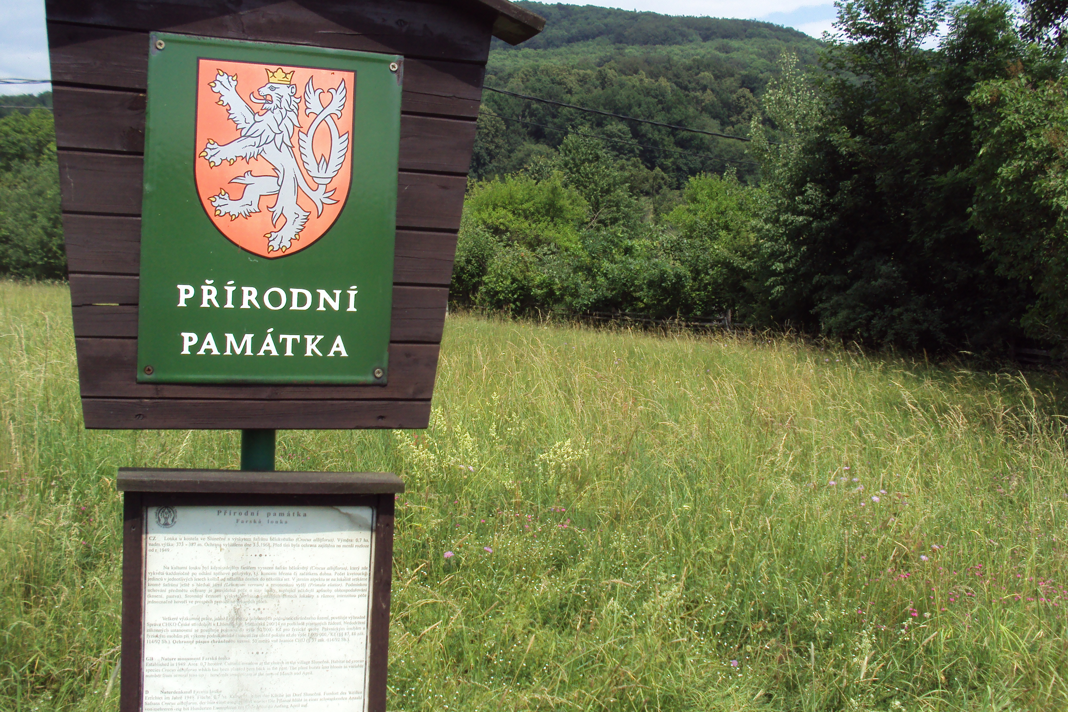 Chráněná Farská louka u kostela, chráněné kvítí již odkvetlé